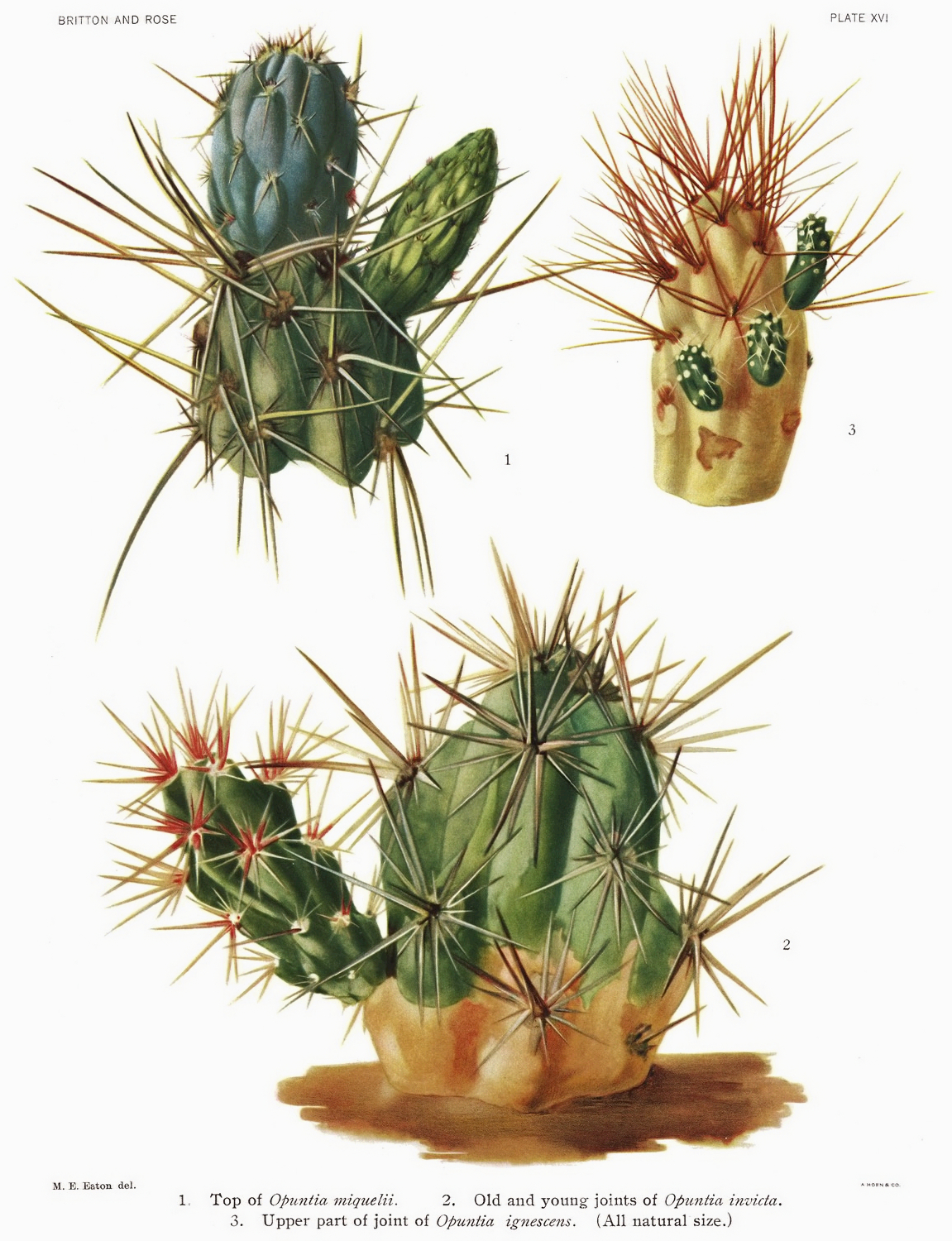 1. Miqueliopuntia miquelii, 2. Grusonia invicta, 3. Cumulopuntia ignescens.